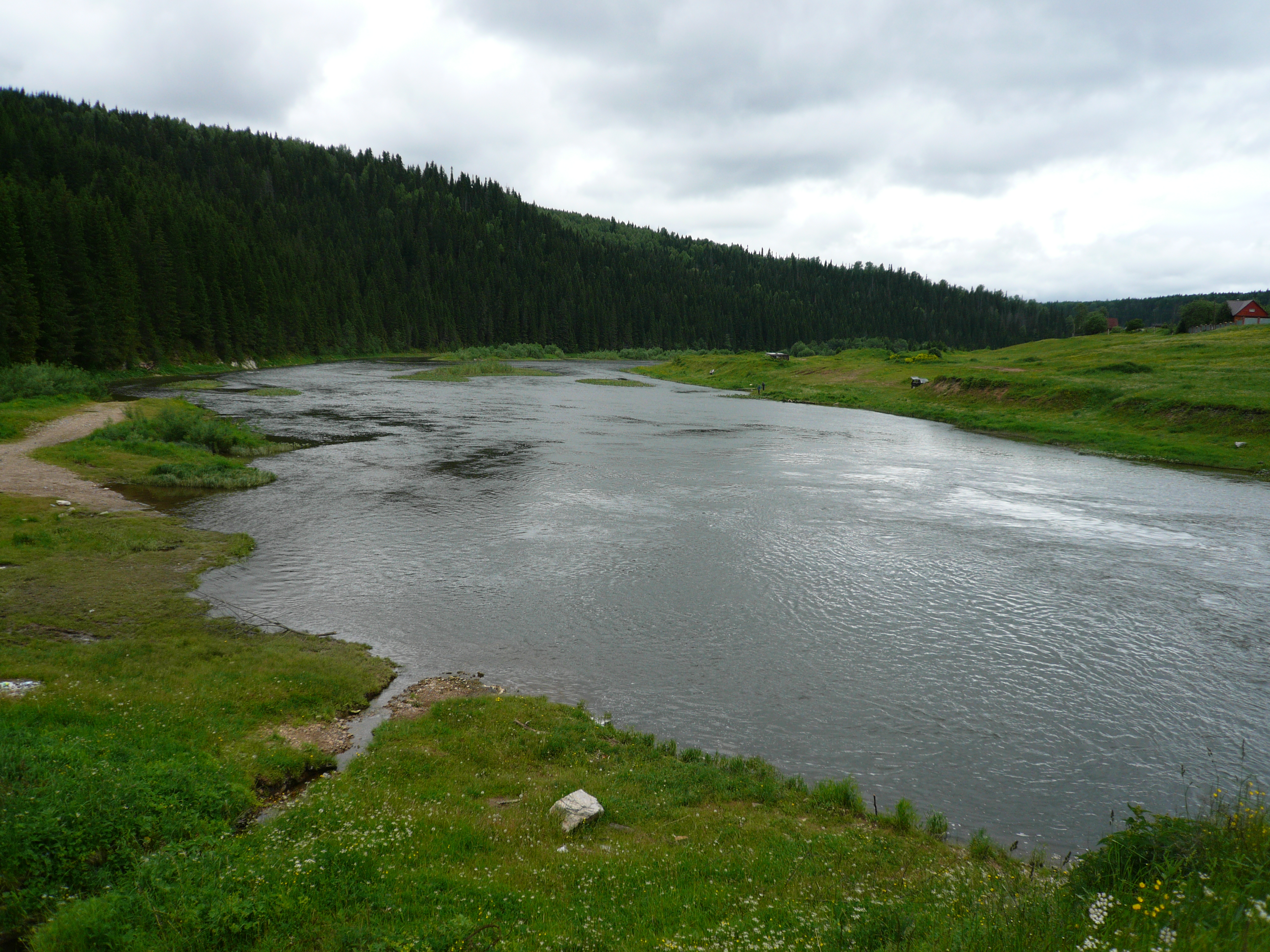 Река Койва возле посёлка Кусье-Александровский.